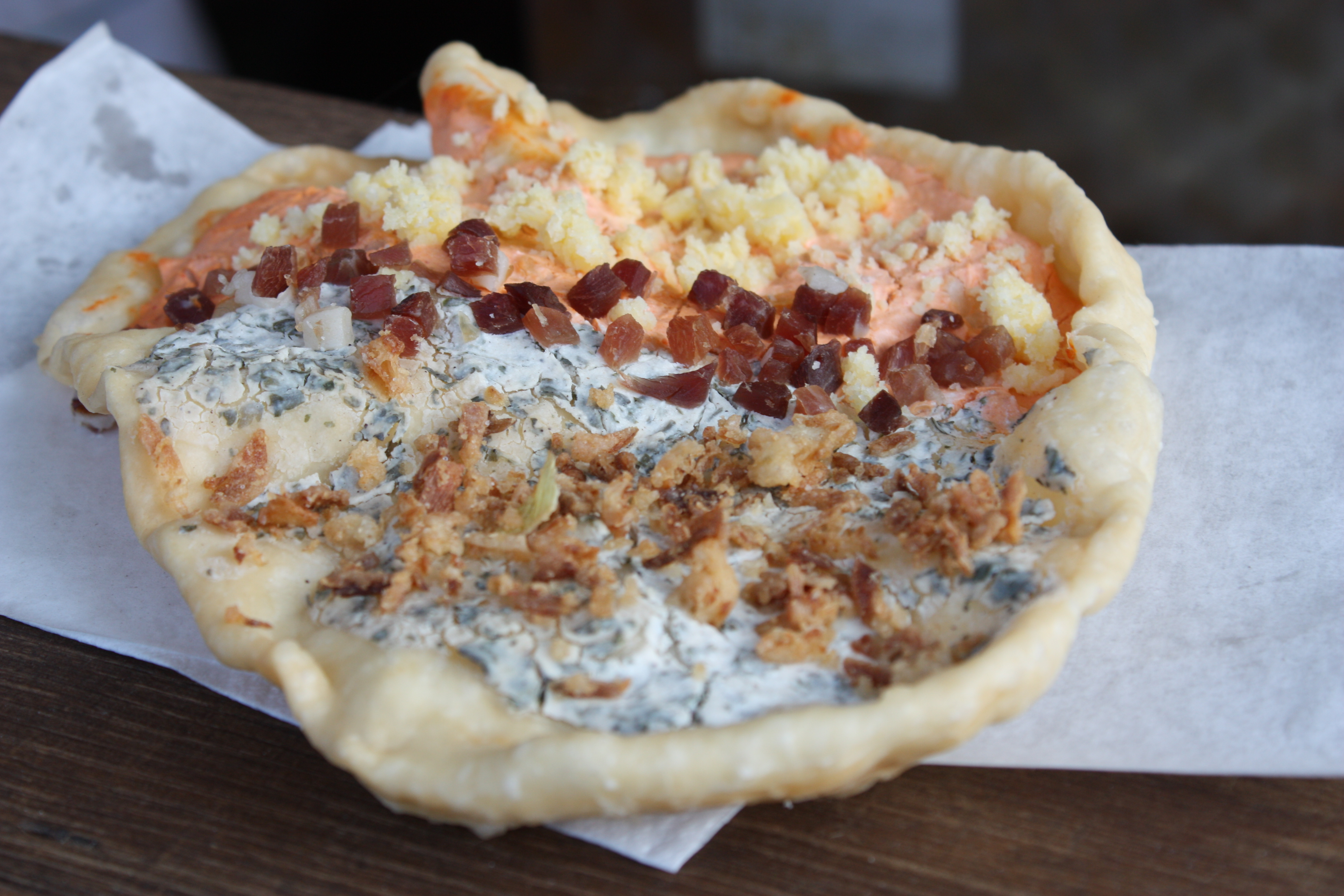 Langos